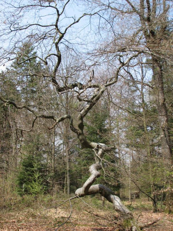 Fau de Verzy (montagne de Reims, Marne, France)